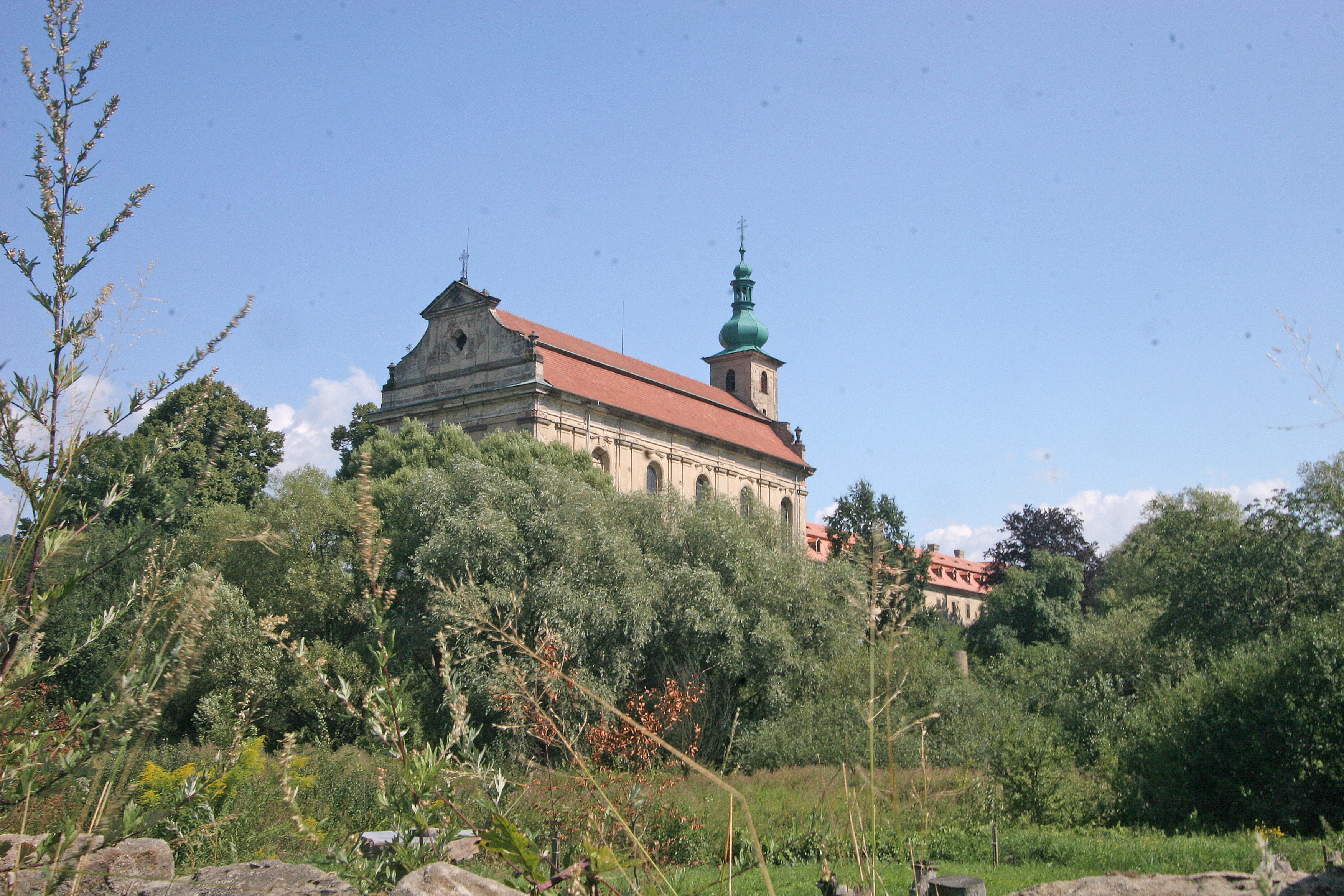 Kostel Nanebevzetí P. Marie (Konojedy), Konojedy